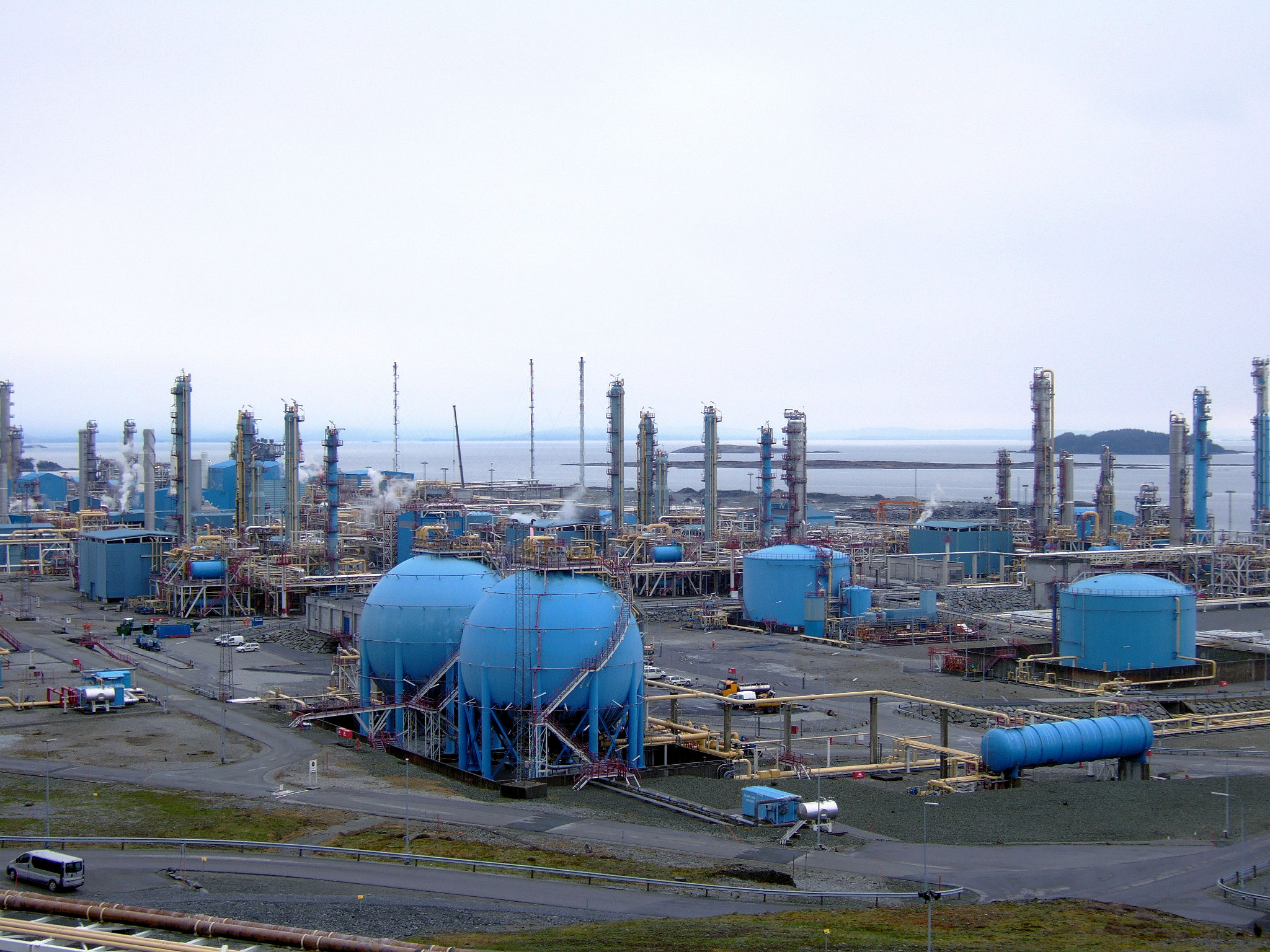 Kårstø Statoil, Rogaland, Norway